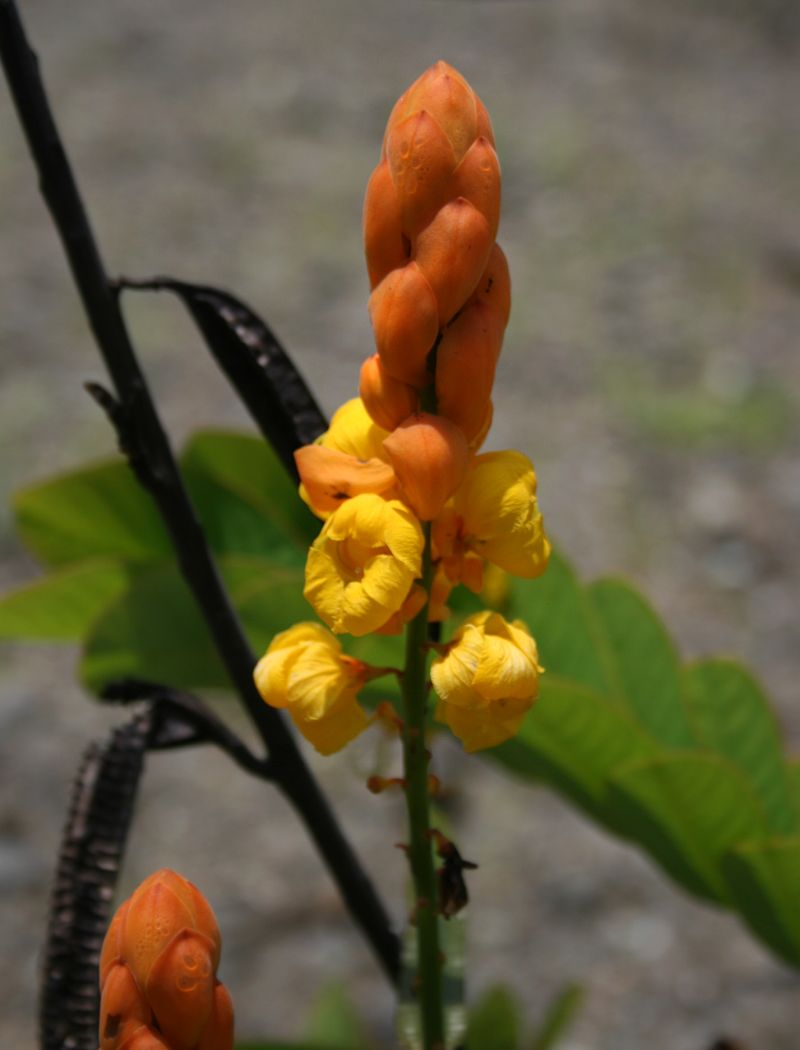 Senna alata, Hülsenfrüchtler (Fabaceae), Caesalpinioideae - Costa Rica: Prov. Puntarenas, La Gamba NW Golfito, Valle Bonito